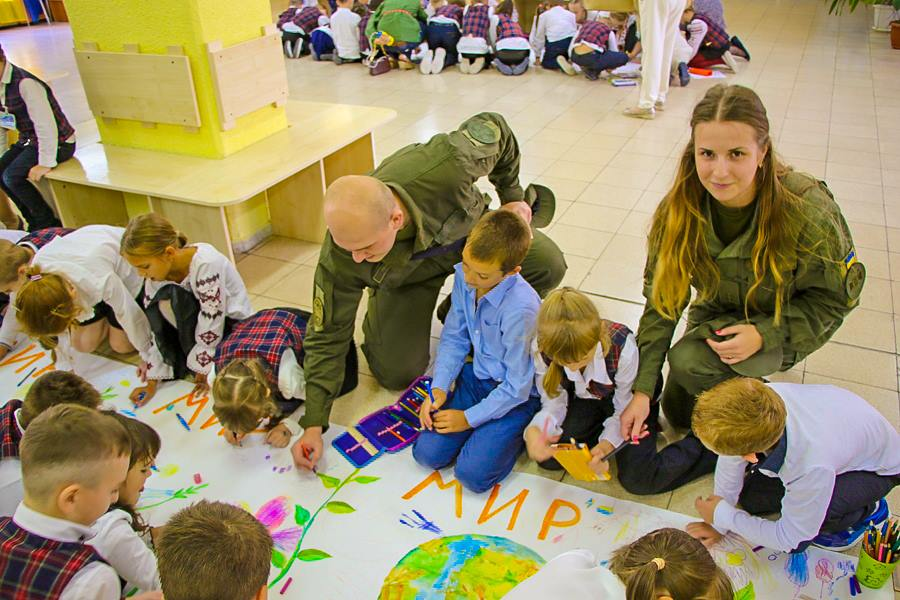 Діяльність CIMIC NGU з доставки гуманітарної допомоги